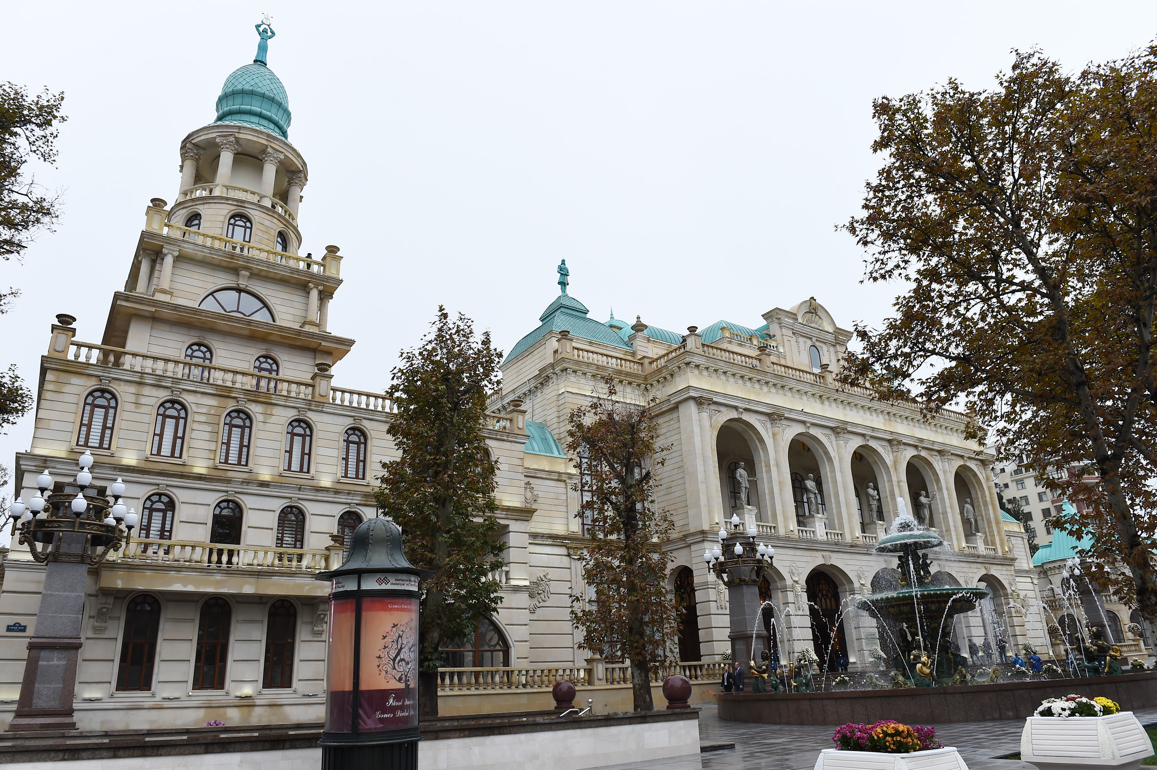 Ganja State Philharmonic Hall